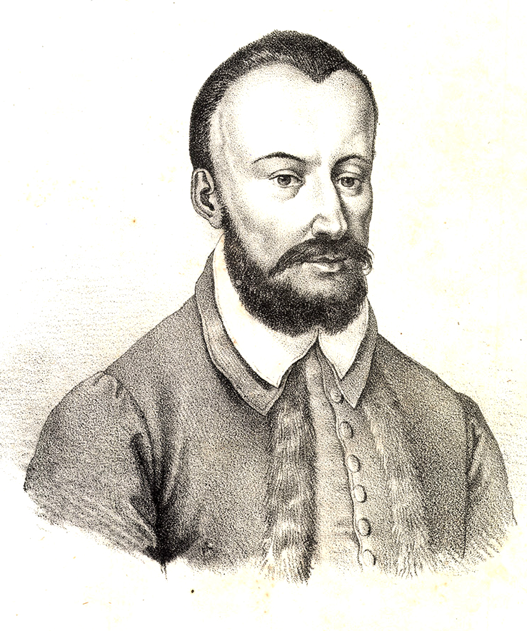 István IX Illésházy (1541–1609), Hungarian statesman